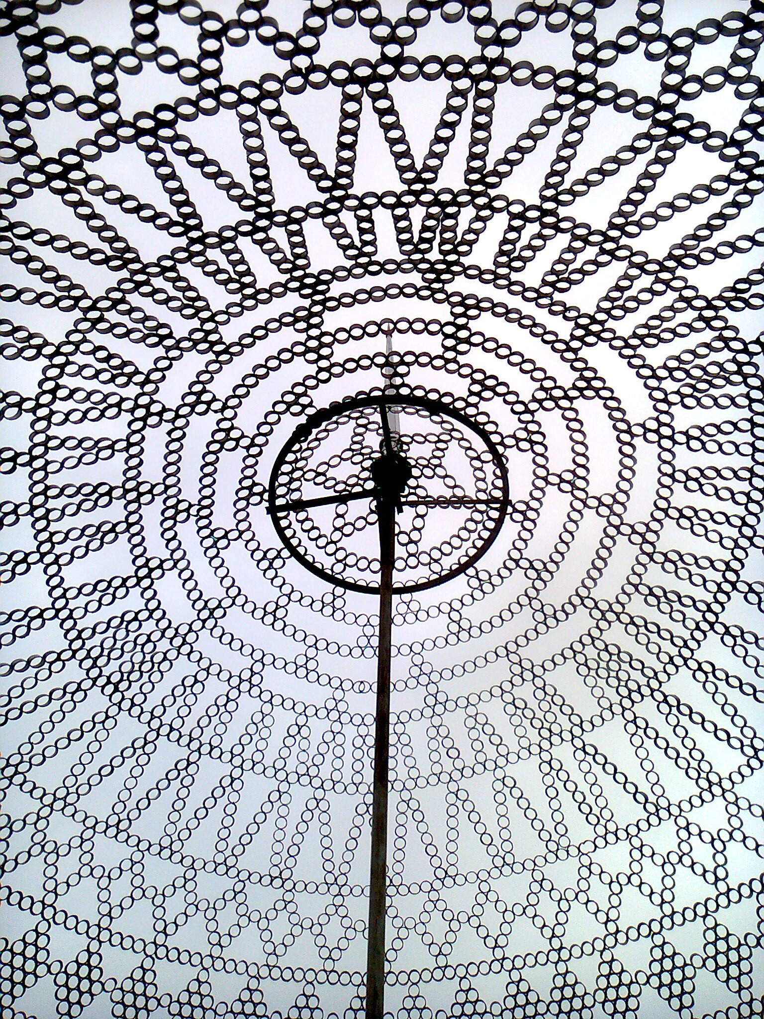 Работа Анаса Мурзакиева в честь башкирских батыров